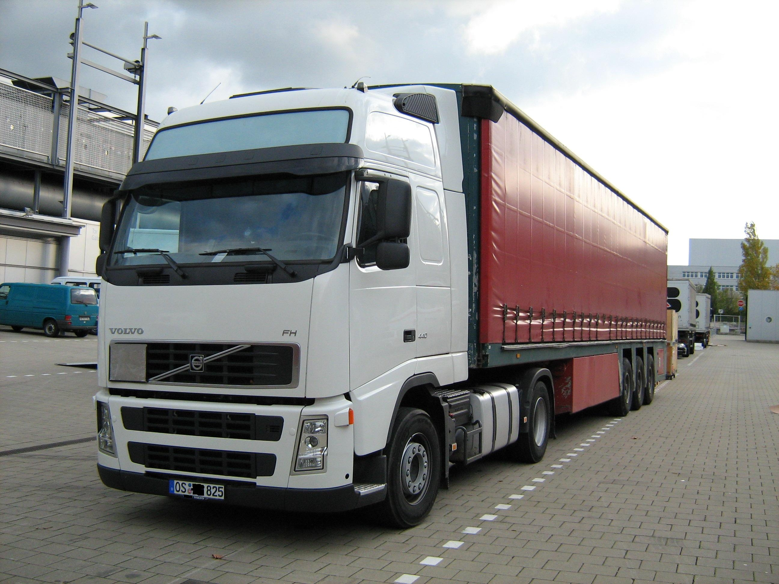 Volvo FH Sattelzug, Typ ab dem Jahr 2001